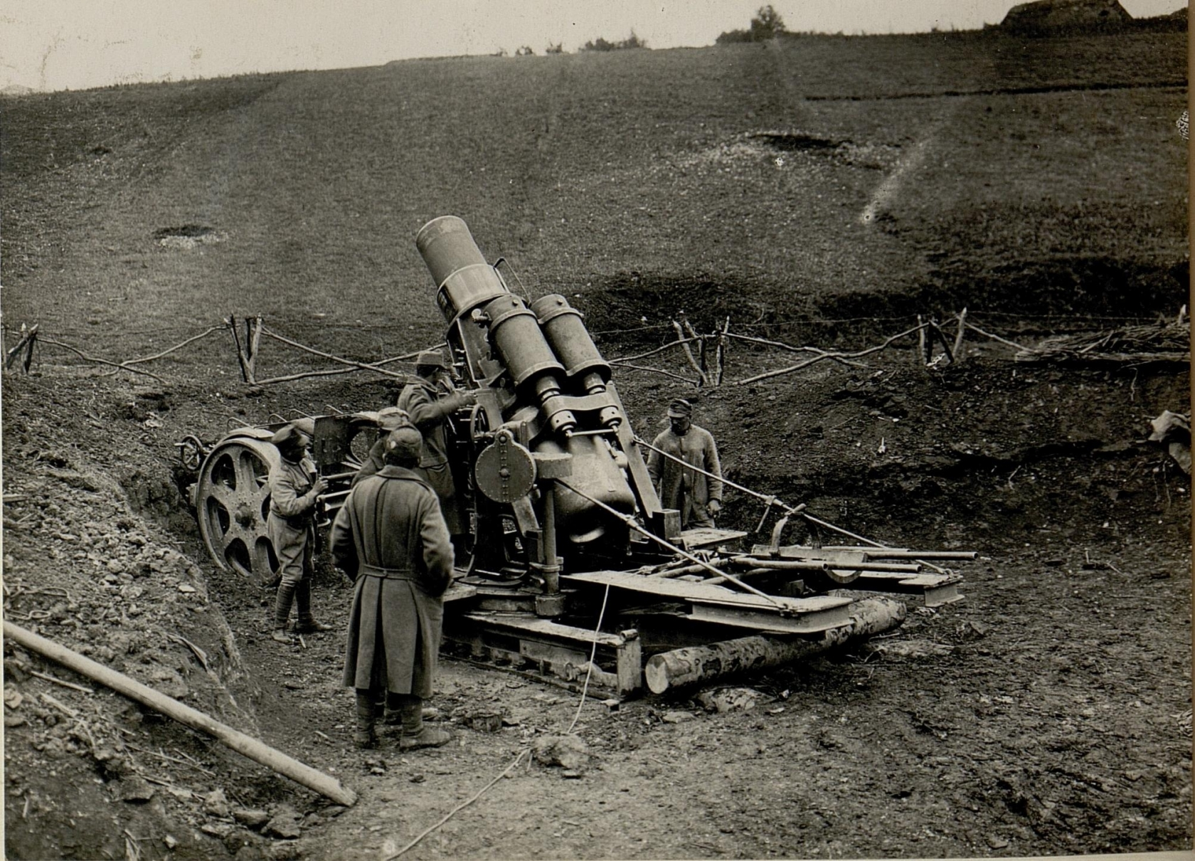 30.5 cm Mörser bei Brzezanyin, 1915 (Korps-Kommando Hoffmann)